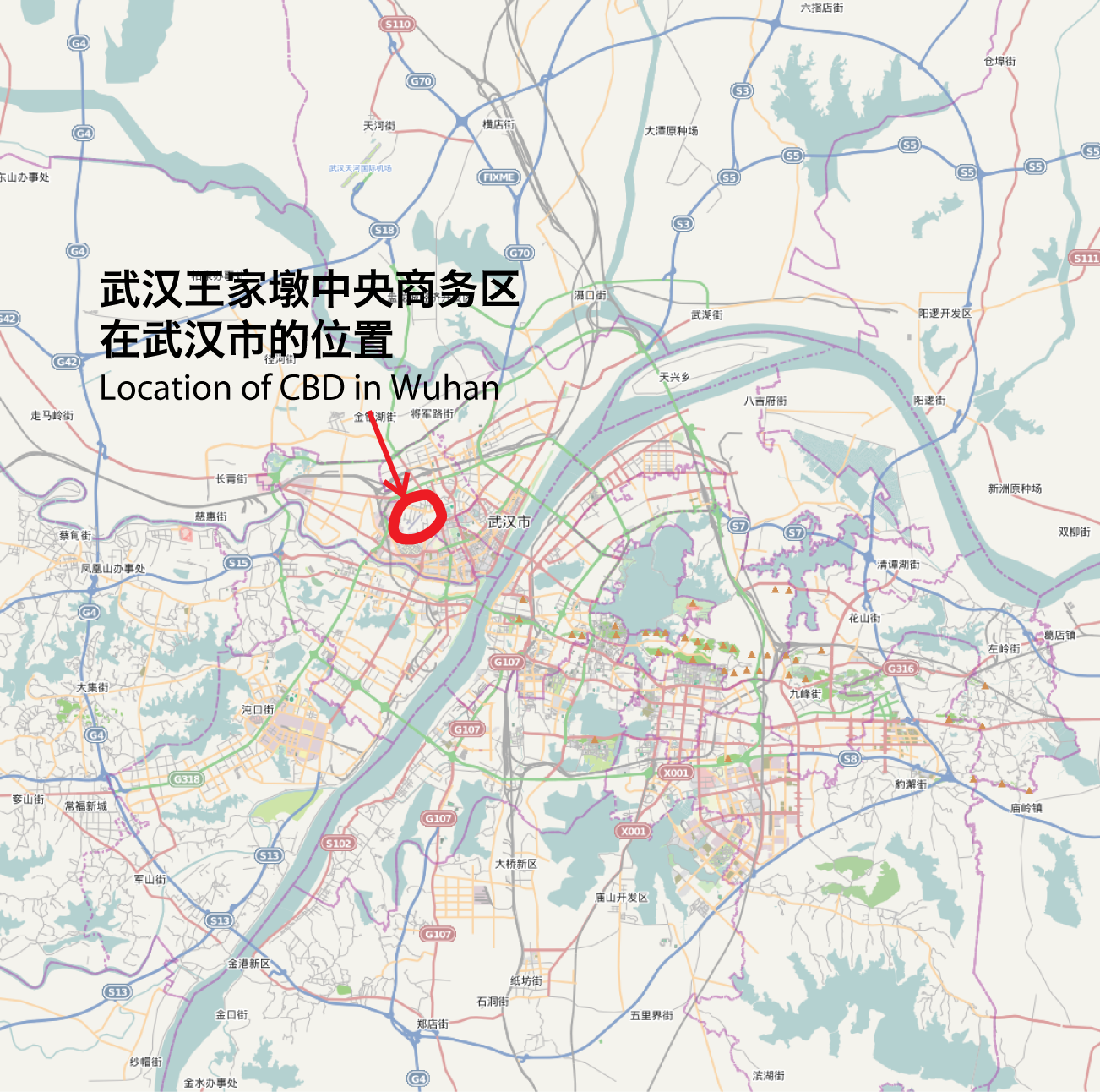 武汉CBD在武汉的位置。底图来自于